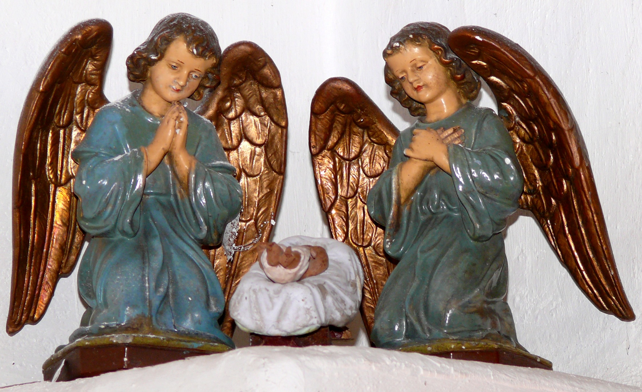 Kirche im Kloster Neuenwalde / Plastik: Zwei betende Engel an der Krippe